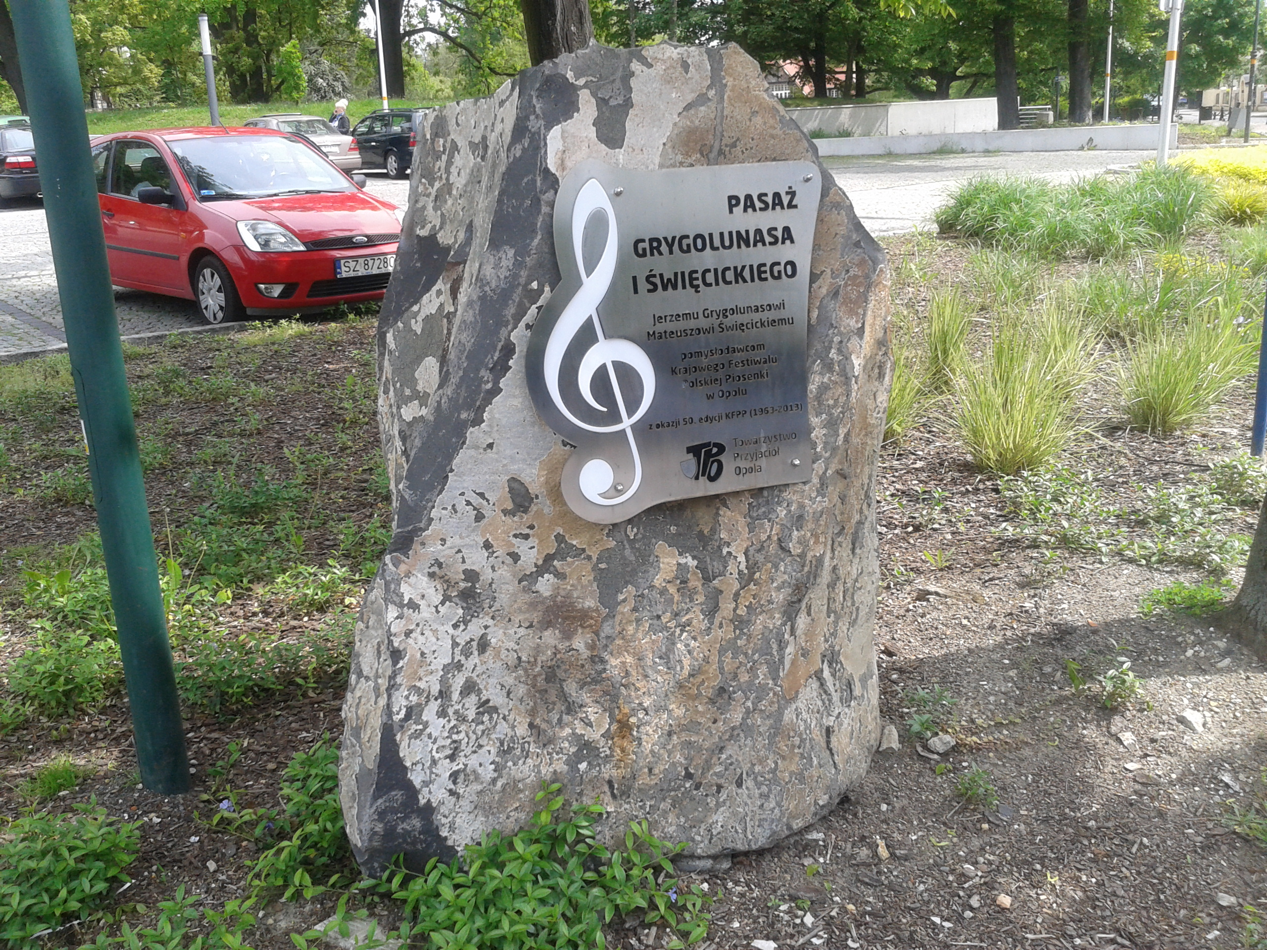 Pomnik poświęcony pomysłodawcom Krajowego Festiwalu Polskiej Piosenki w Opolu